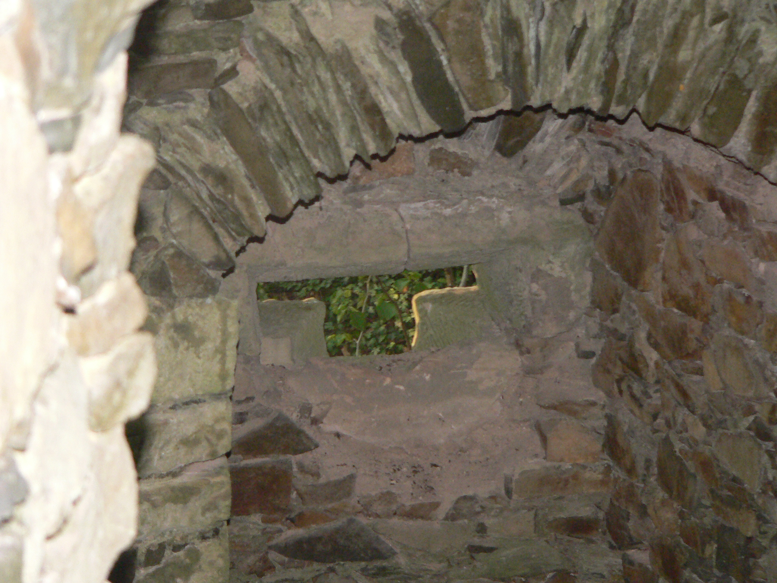 Kanonenturm auf Hohenberneck